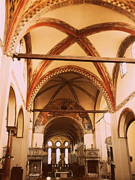 L'interno della chiesa di San Francesco Grande a Padova